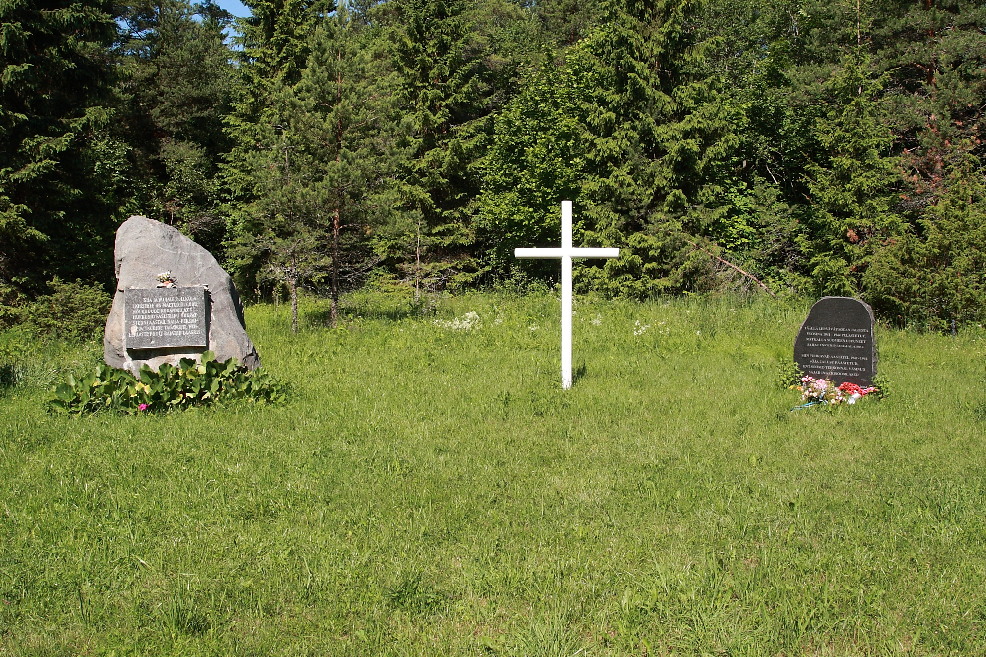 Põllküla terroriohvrite matmispaik